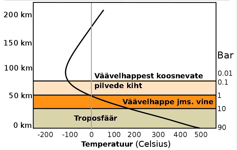 Veenuse atmosfääri skeem